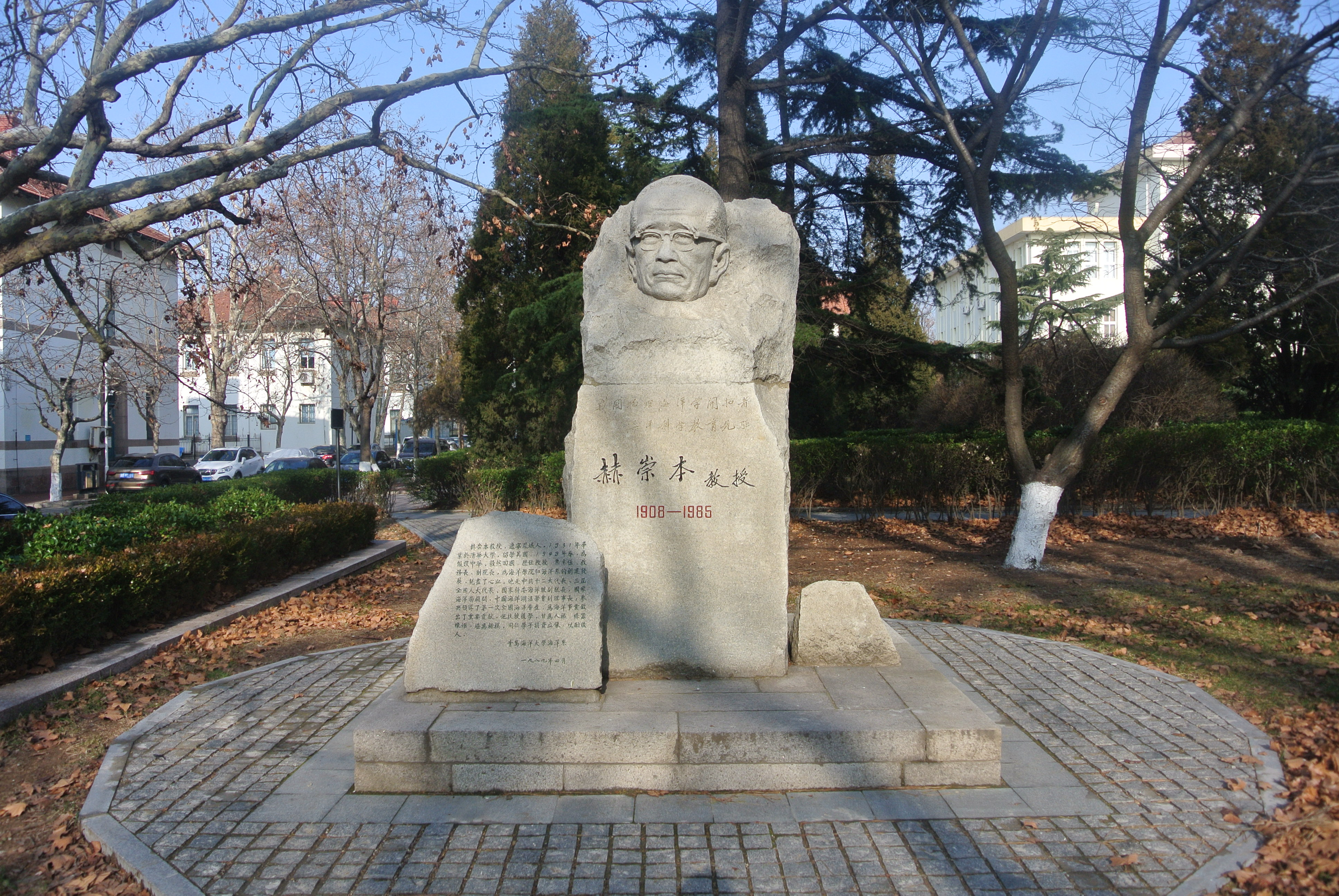 中国海洋大学鱼山校区赫崇本雕像